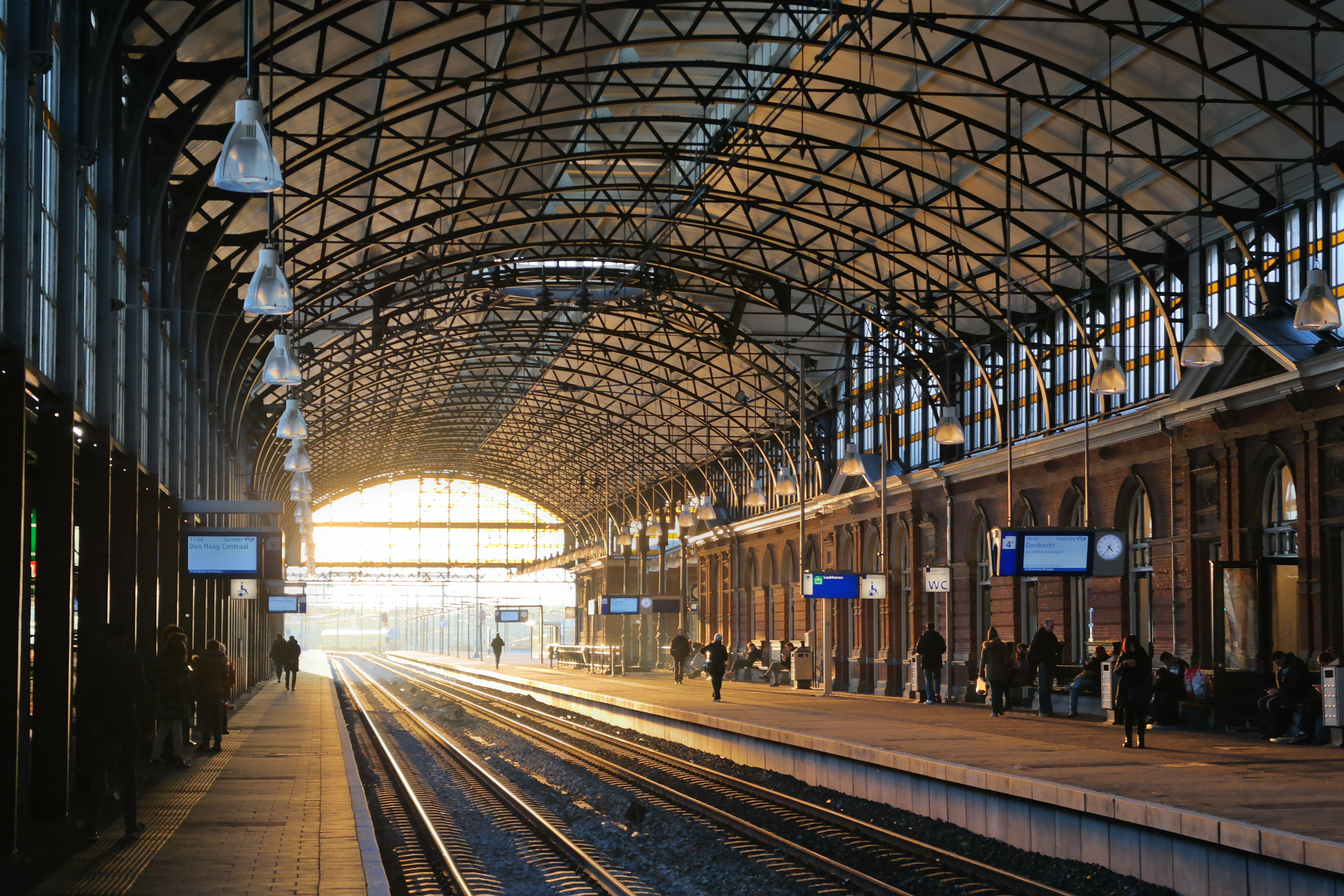 Station Den Haag Hollands Spoor.